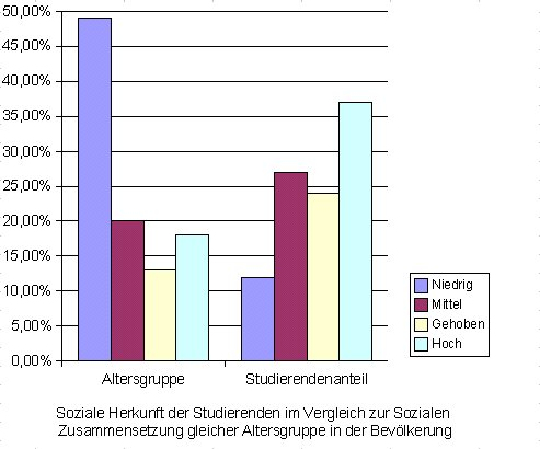 Grafik. Studierende nach sozialer Herkunft im Vergleich mit gleicher Altersgruppe in der Bevölkerung. Quelle 17. DSW-Sozialerhebung.